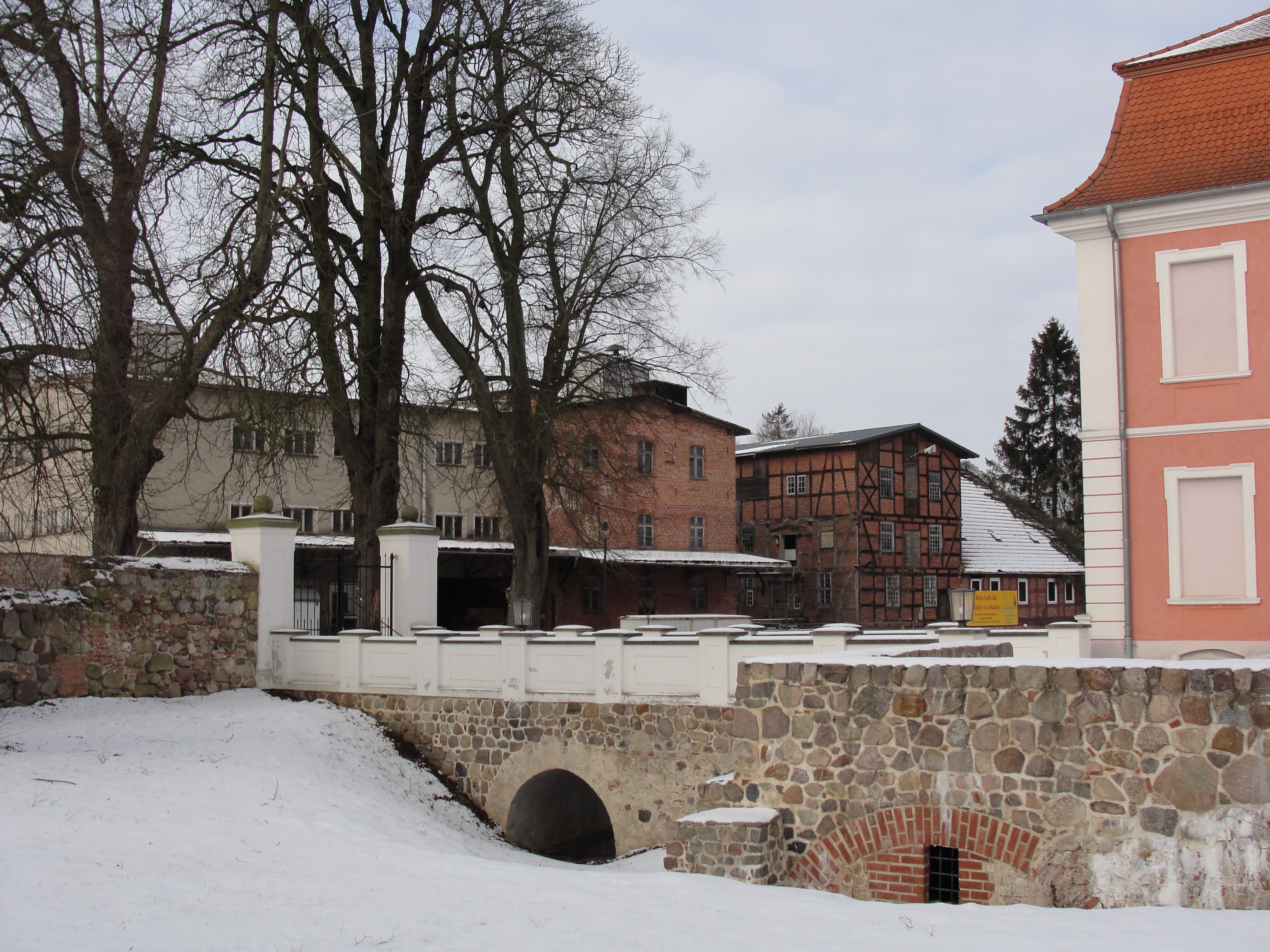 Blick vom Gutshaus „Schloss Wolfshagen“ zur Wassermühle im Ortsteil Wolfshagen der Gemeinde Groß Pankow (Prignitz). Kamerastandort bei circa 53°8'55 N / 12°0'33" E.